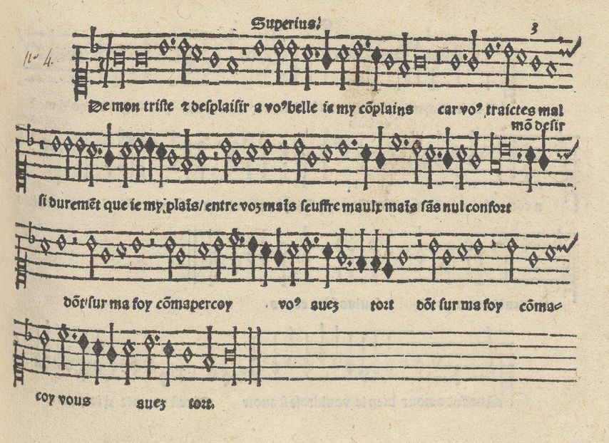 De mon triste déplaisir (supérius) (édition de 1529)